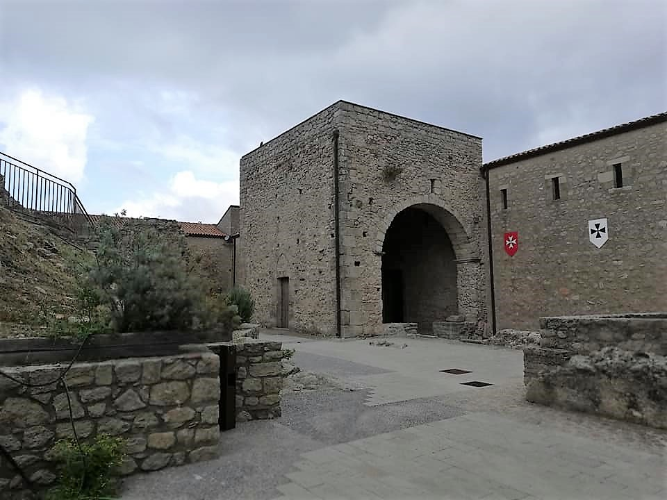 Abside cappella.